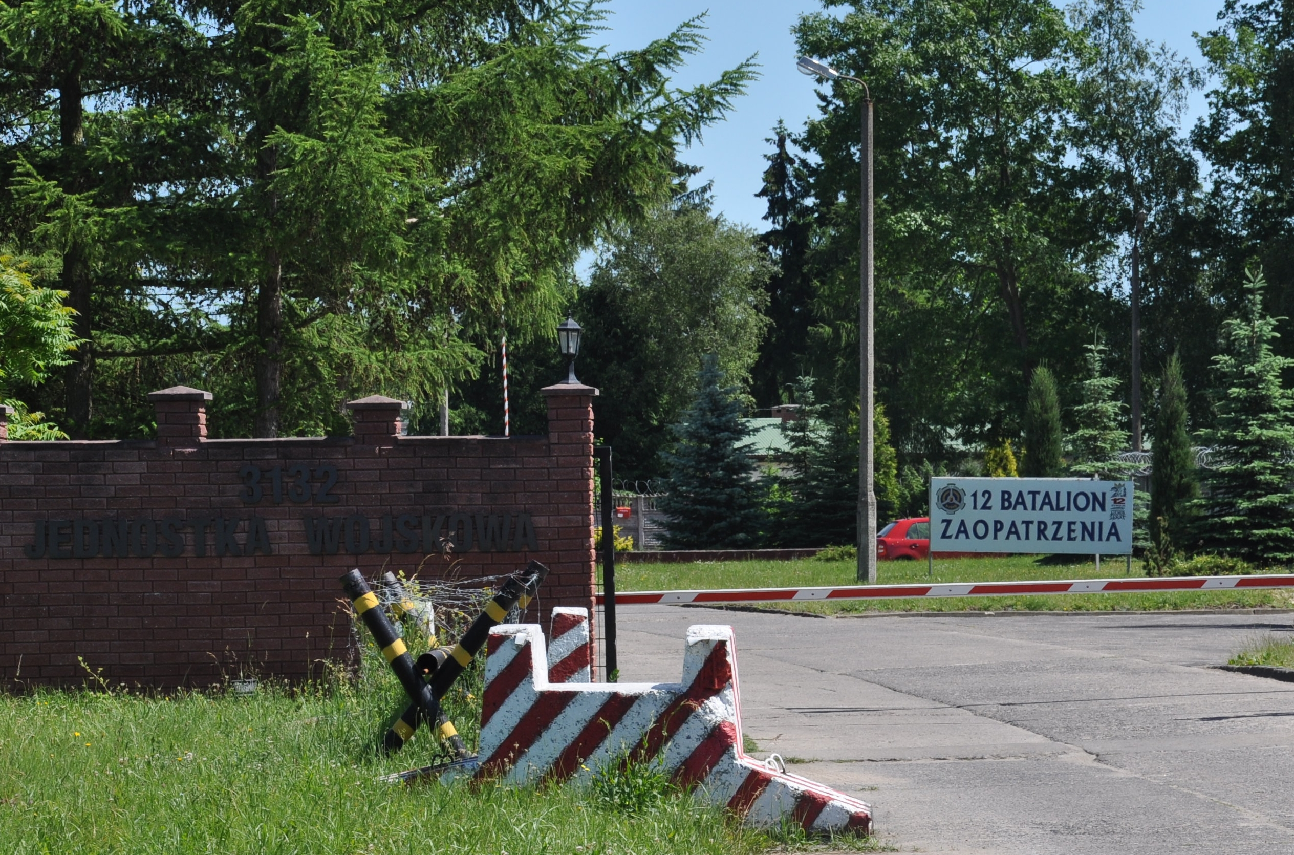 Koszary 12 batalionu zaopatrzenia w w Kobylance